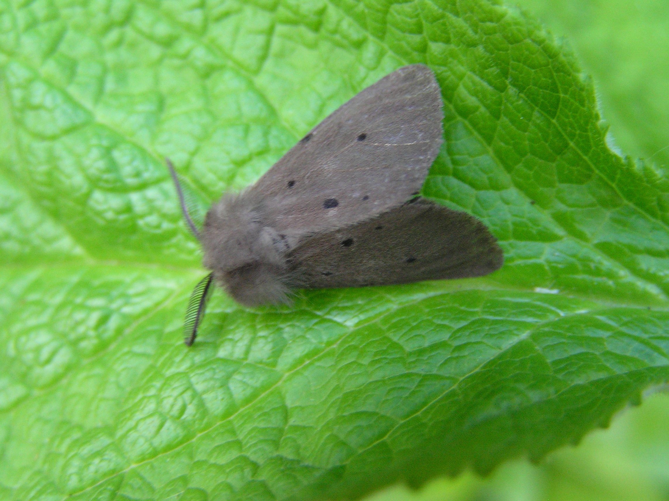 Diaphora mendica male